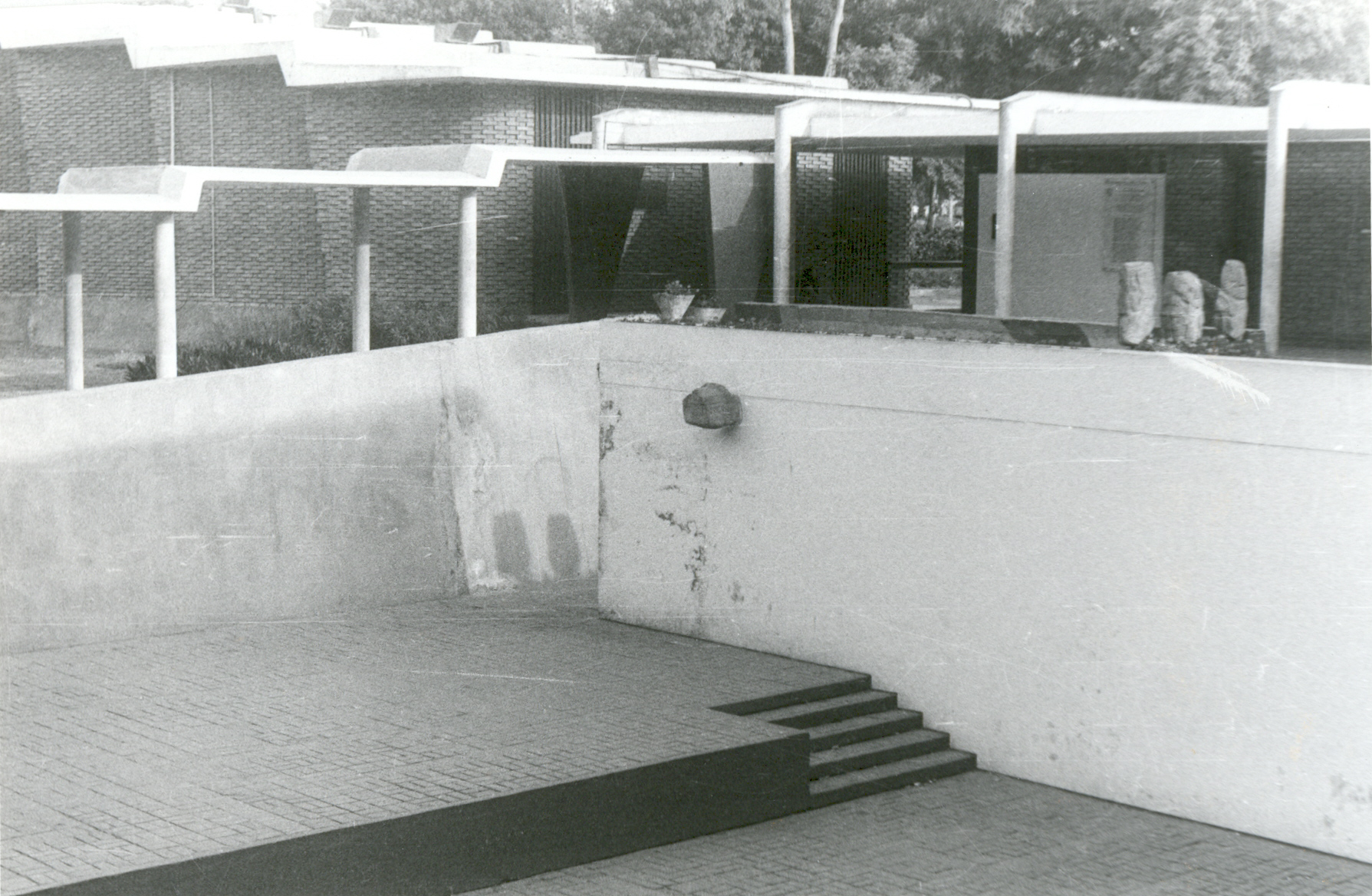 Patio hundido de la Facultad de Arquitectura, Urbanismo y Artes de la Universidad Nacional de Ingeniería, Lima, Perú.